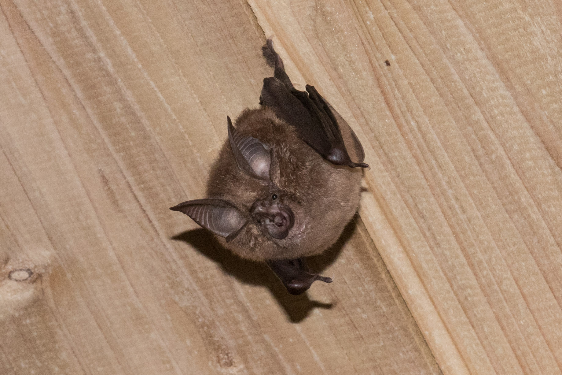 コキクガシラコウモリ (学名:Rhinolophus cornutus) 撮影地：福島県いわき市